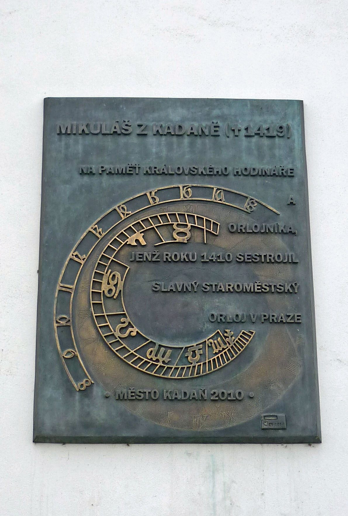 Kadaň, pamětní deska Mikuláše z Kadaně.